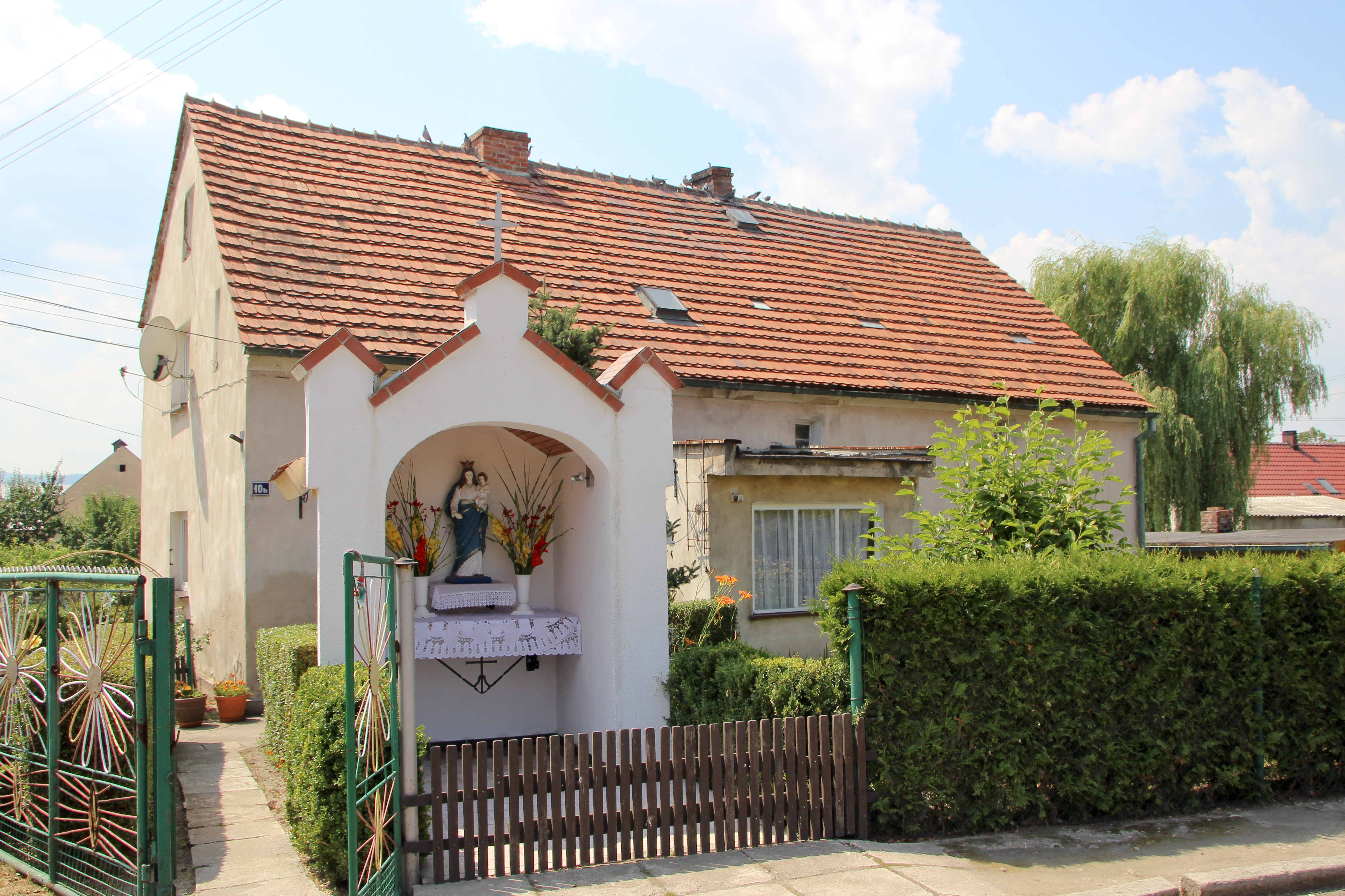 Ujeździec – wieś w Polsce, w województwie opolskim, w powiecie nyskim, w gminie Paczków.